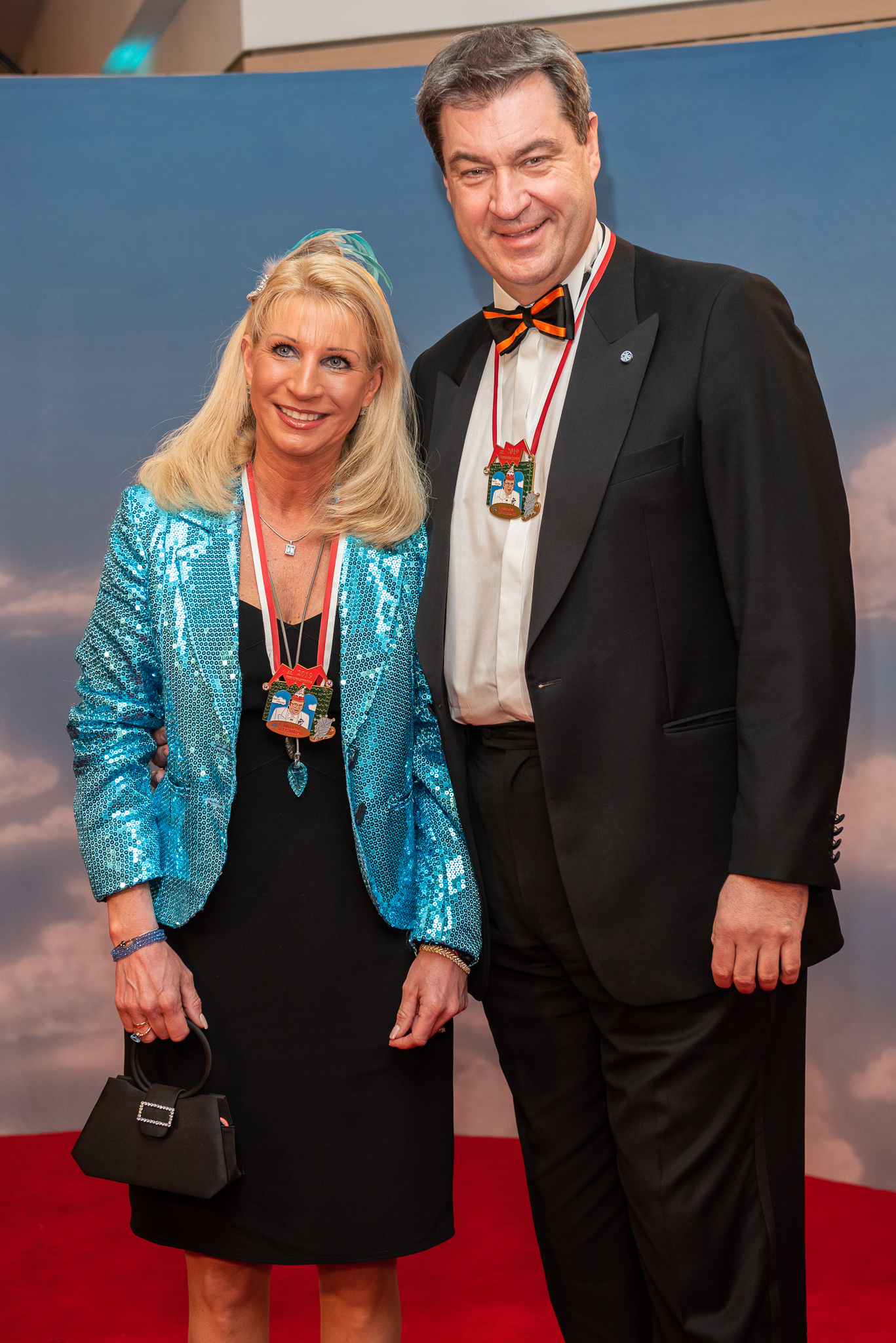 BR,Bayerisches Fernsehen,Fastnacht in Franken,Fastnachts-Verband Franken,Karin Baumüller-Söder,Karneval,Live-Sendung,Mainfrankensäle,Markus Söder